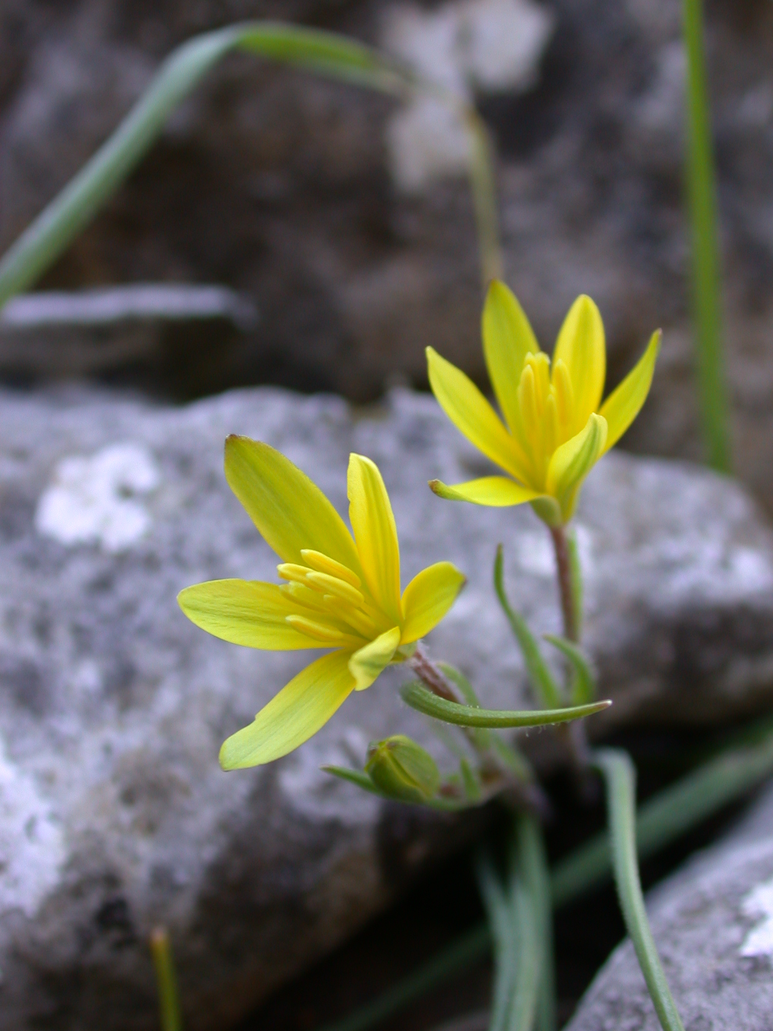 Gagea Chlorantha (M.Bieb.) Schult. & Schult.f. (זהבית דמשקאית), Har Shezor, Upper Galilee, Israel, February 8, 2007. Other names: Gagea damascena Boiss. & Gaill.